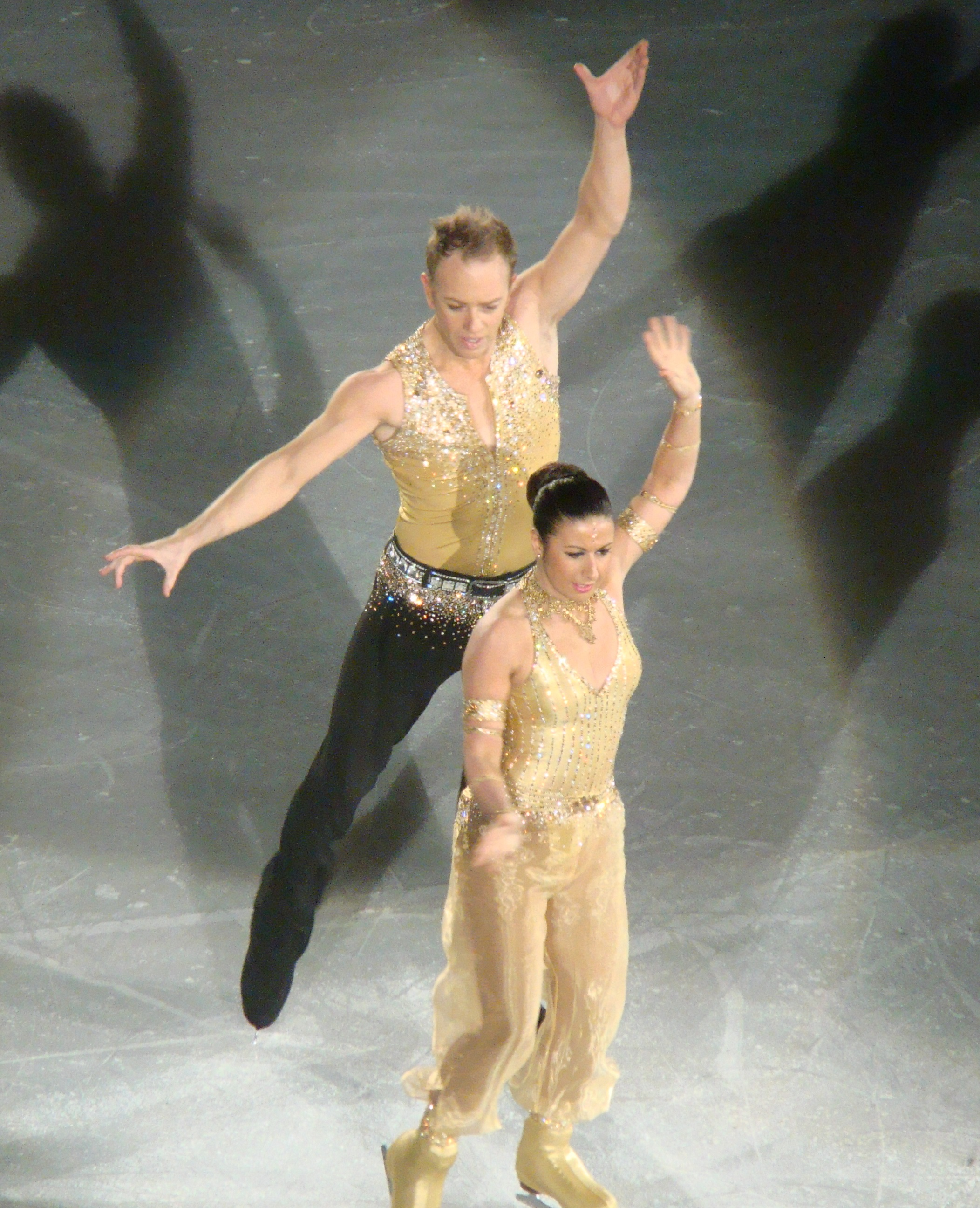 Dan Whiston & Hayley Tamaddon